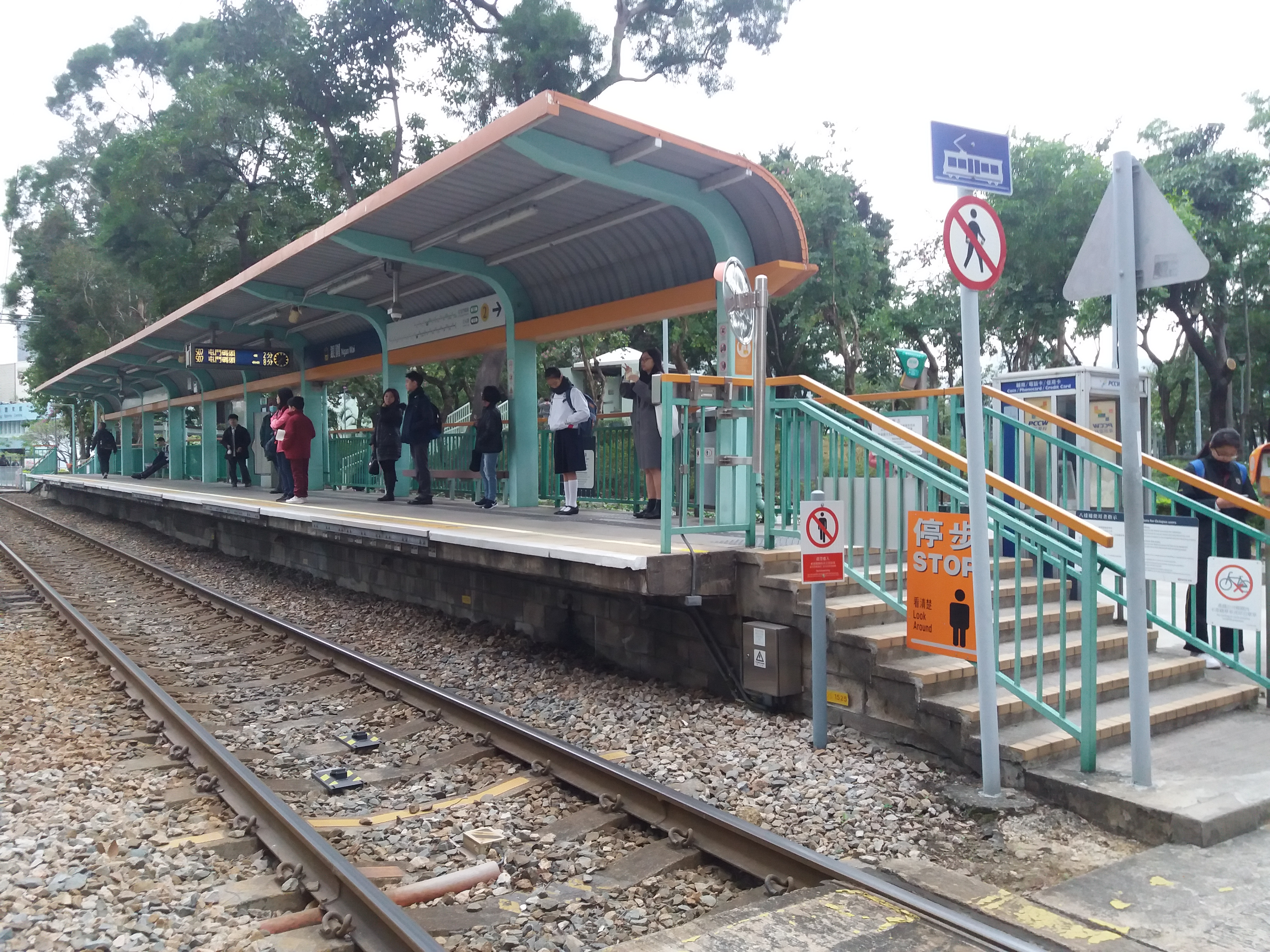 中文（香港）: 銀圍站2號月台